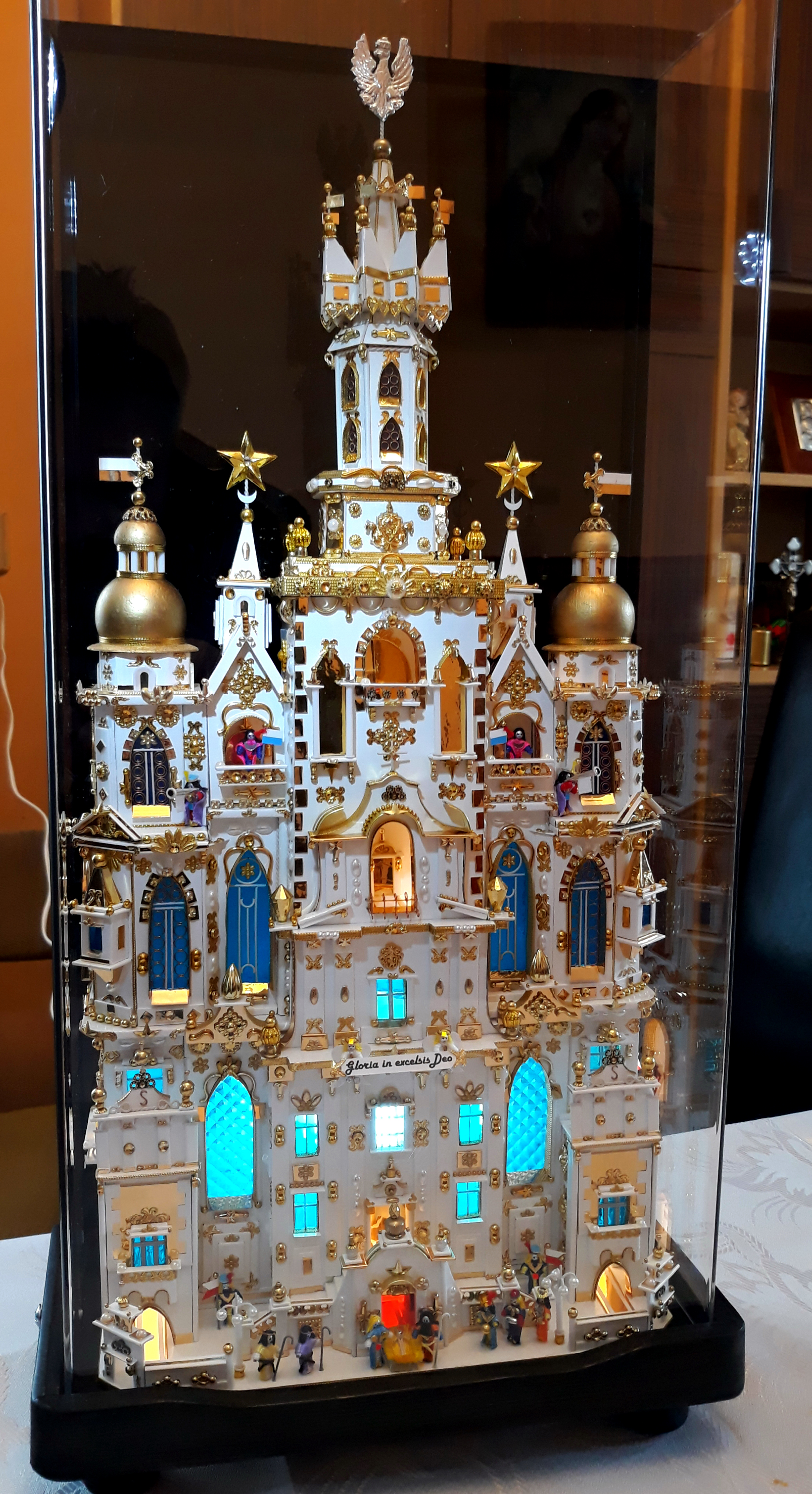 Kazimierz Stopiński jest autorem unikatowych na skalę światową szopek białych - na zdjęciu prezentowane jest dzieło z roku 2018.